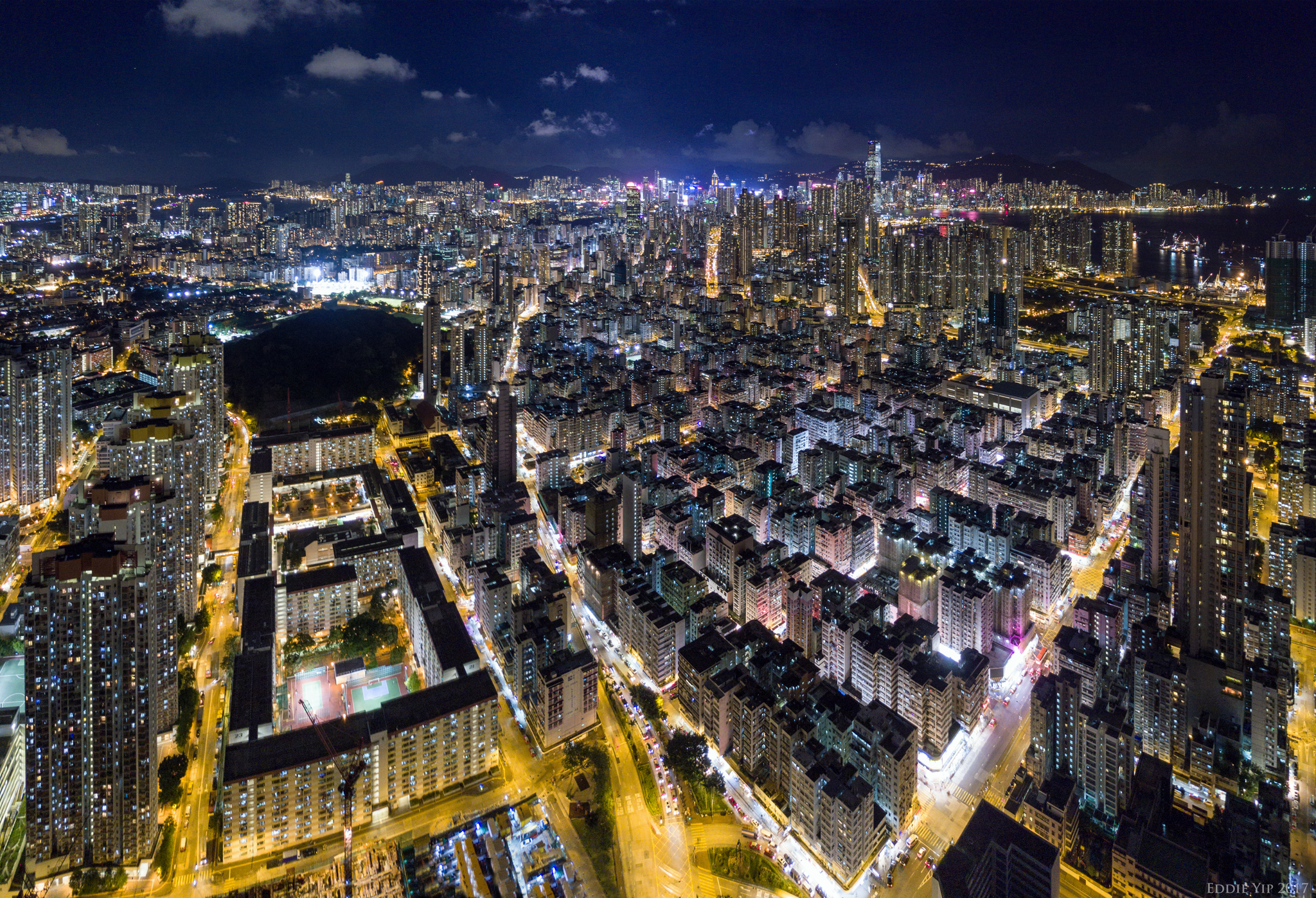 夜行嘉頓山